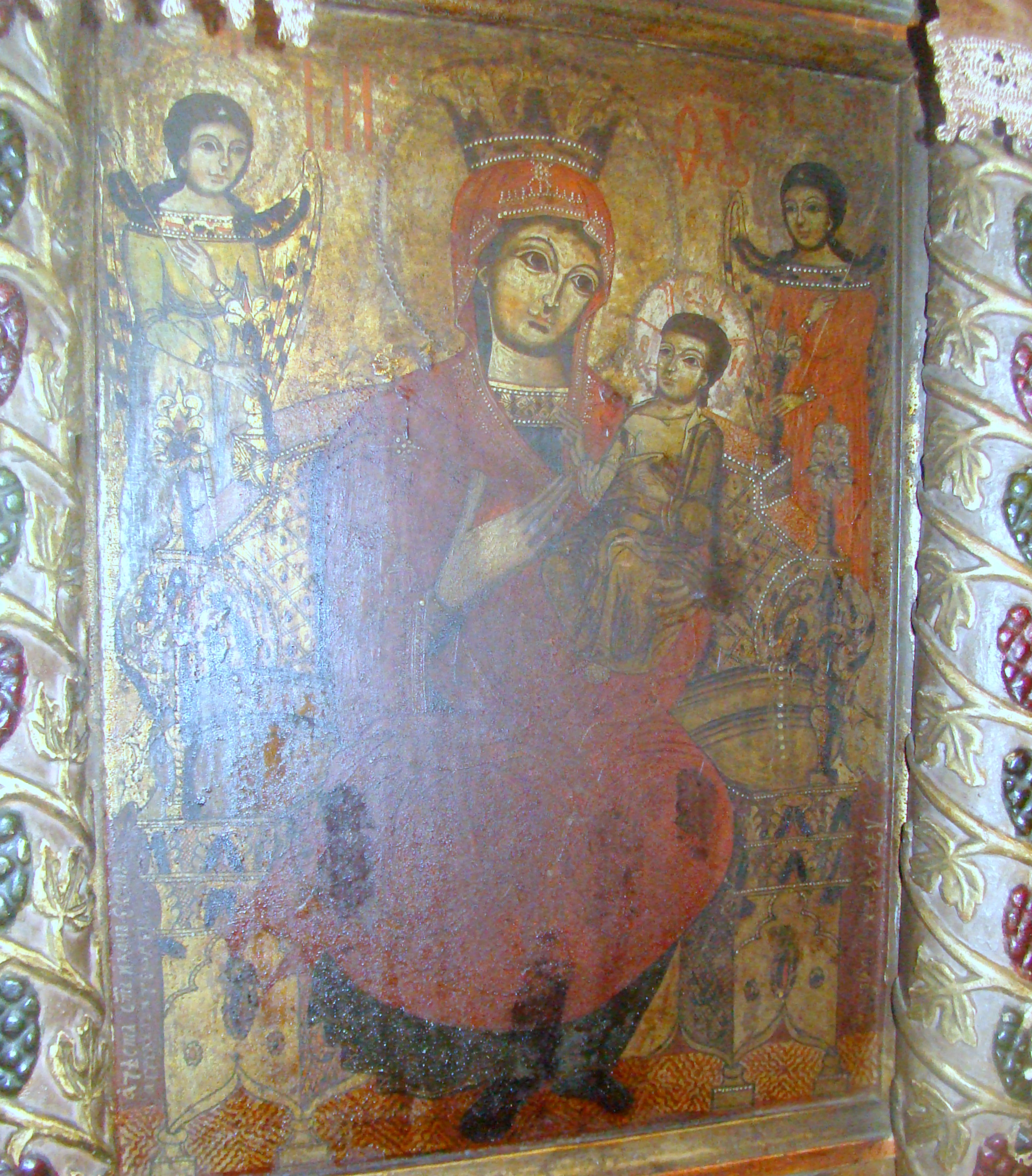 Biserica de lemn „Sfinții Arhangheli” din Reghin, județul Mureș